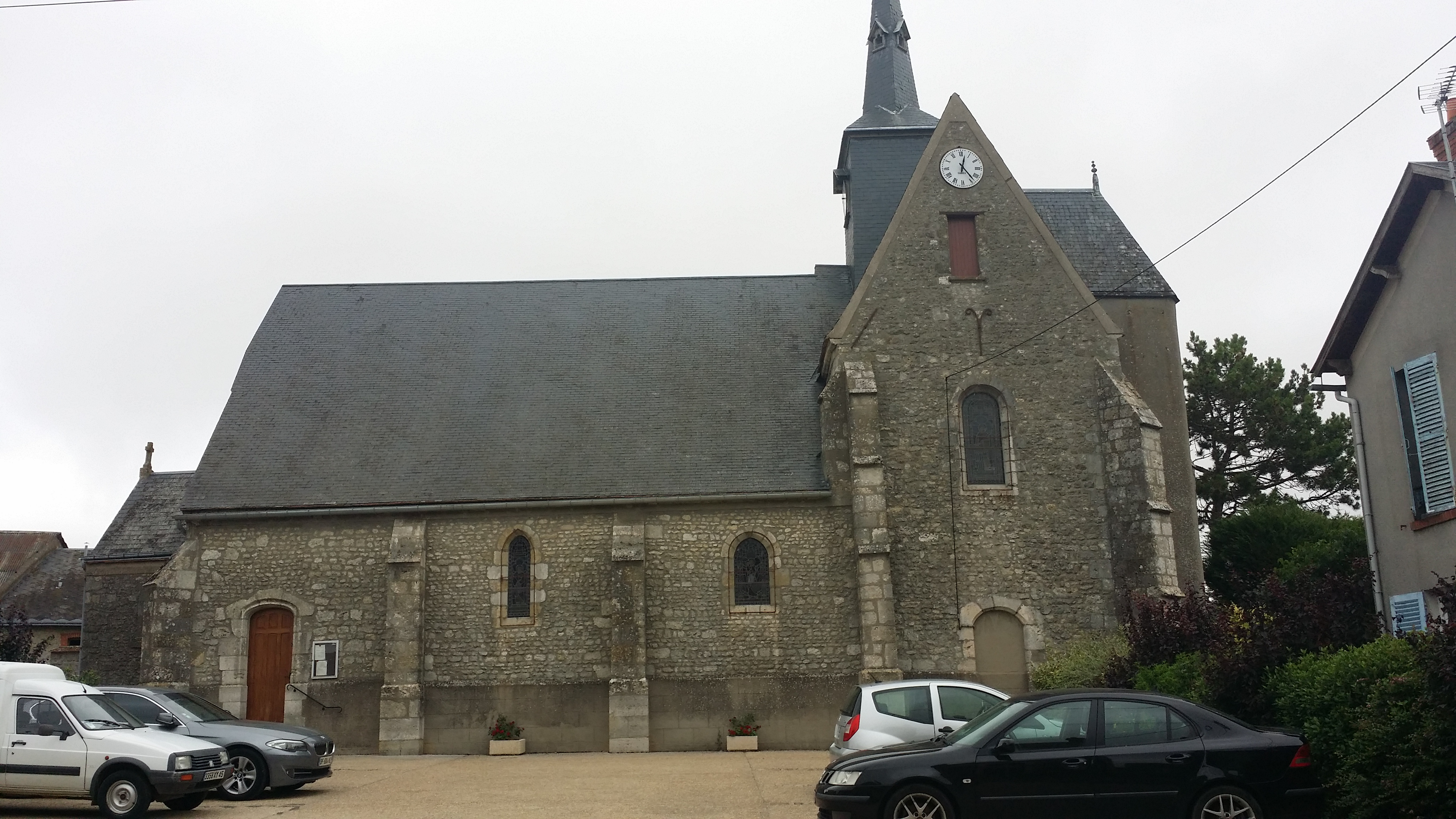 Eglise